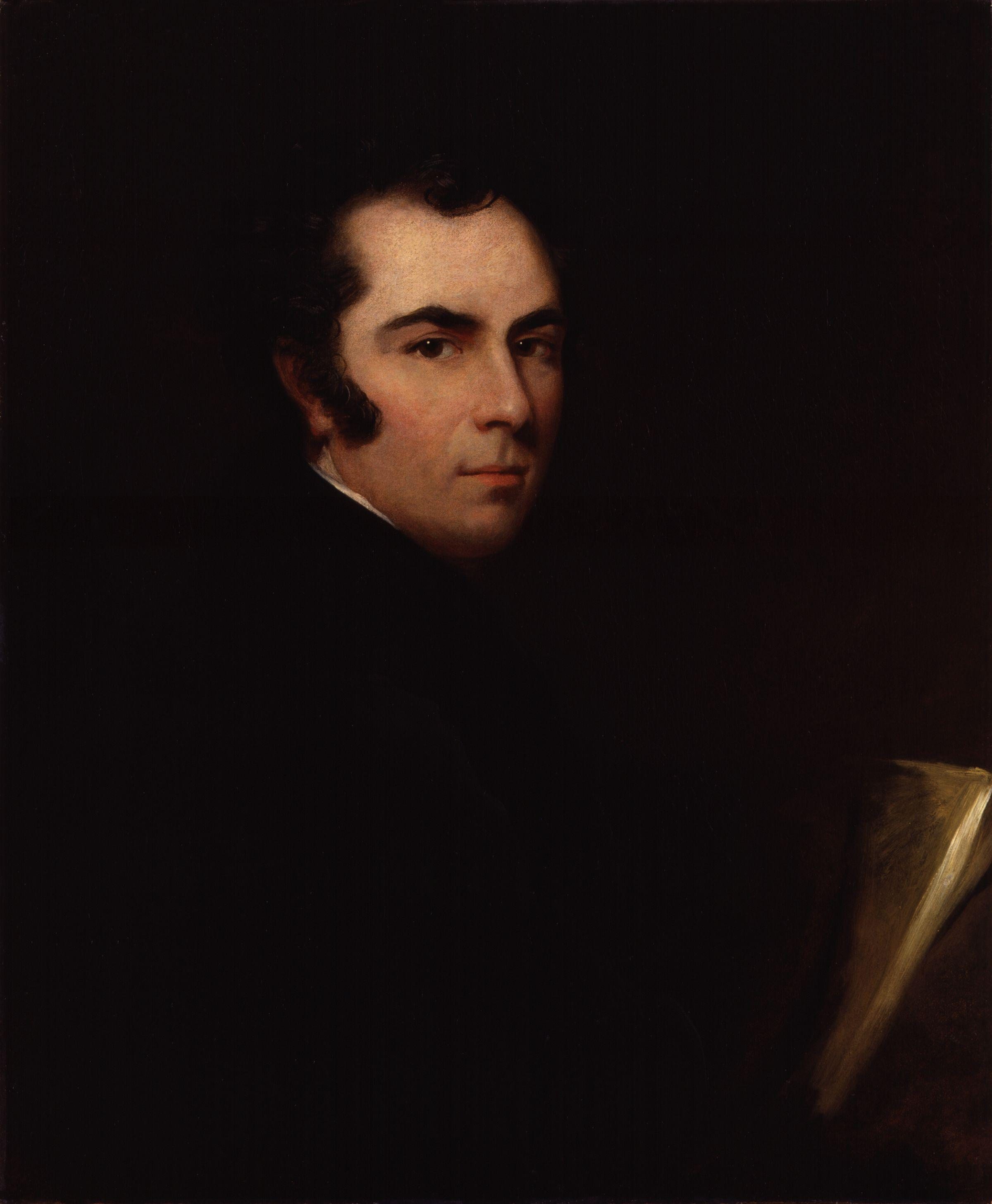 Self-portrait